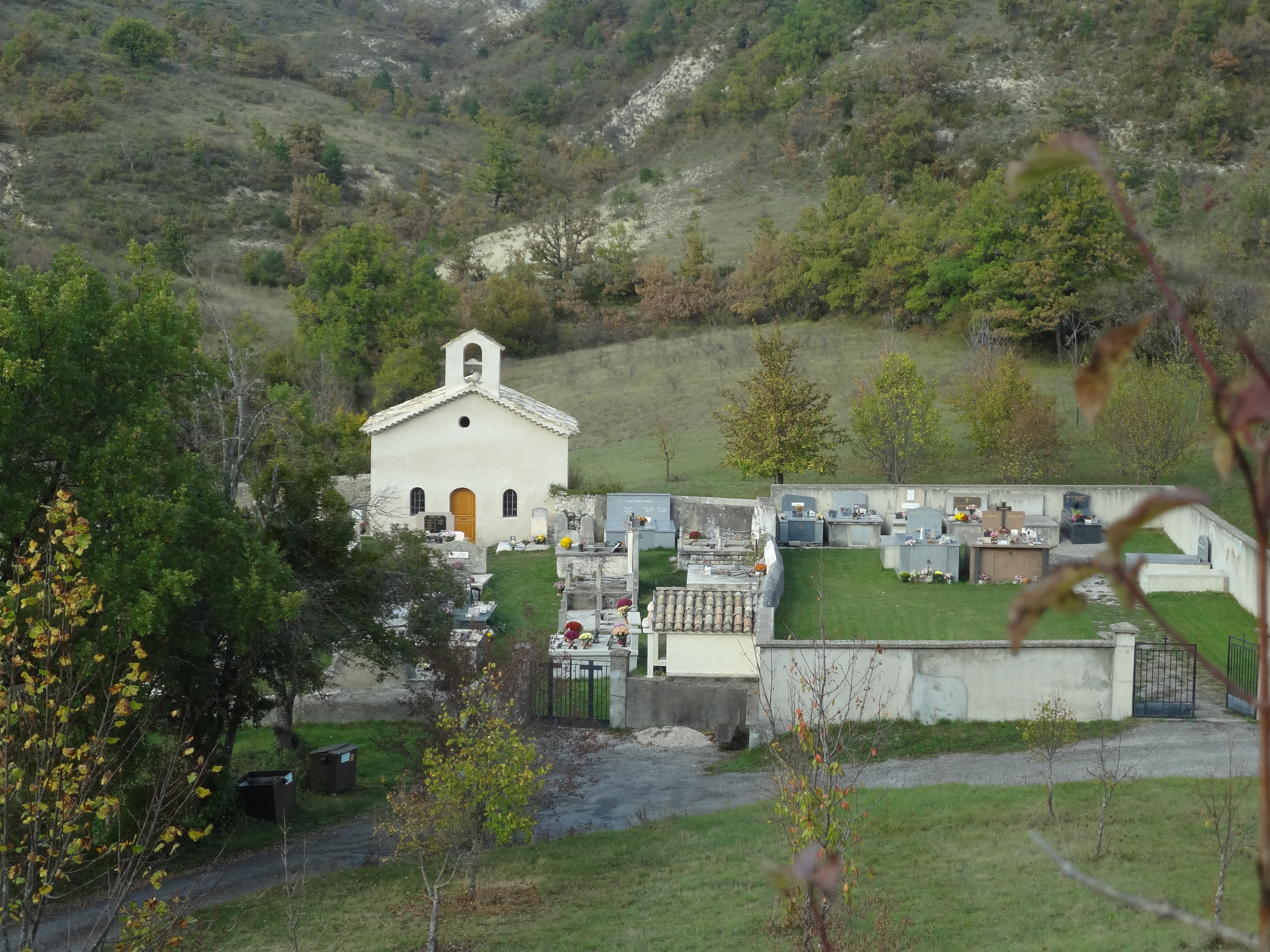 Nouvelle église Saint-Vincent de Saint-Vincent-sur-Jabron, en vallée, et cimetière